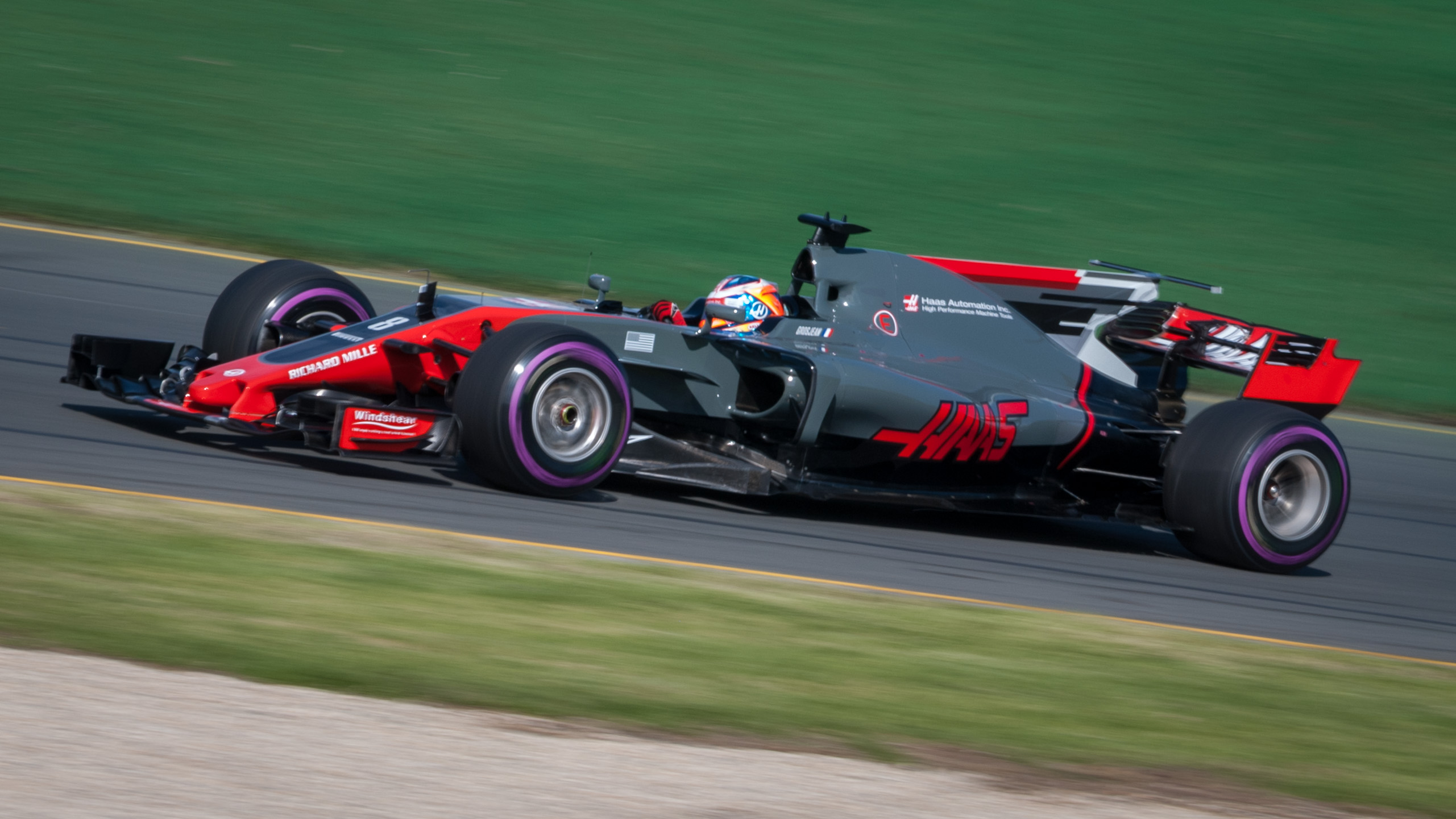 Romain Grosjean